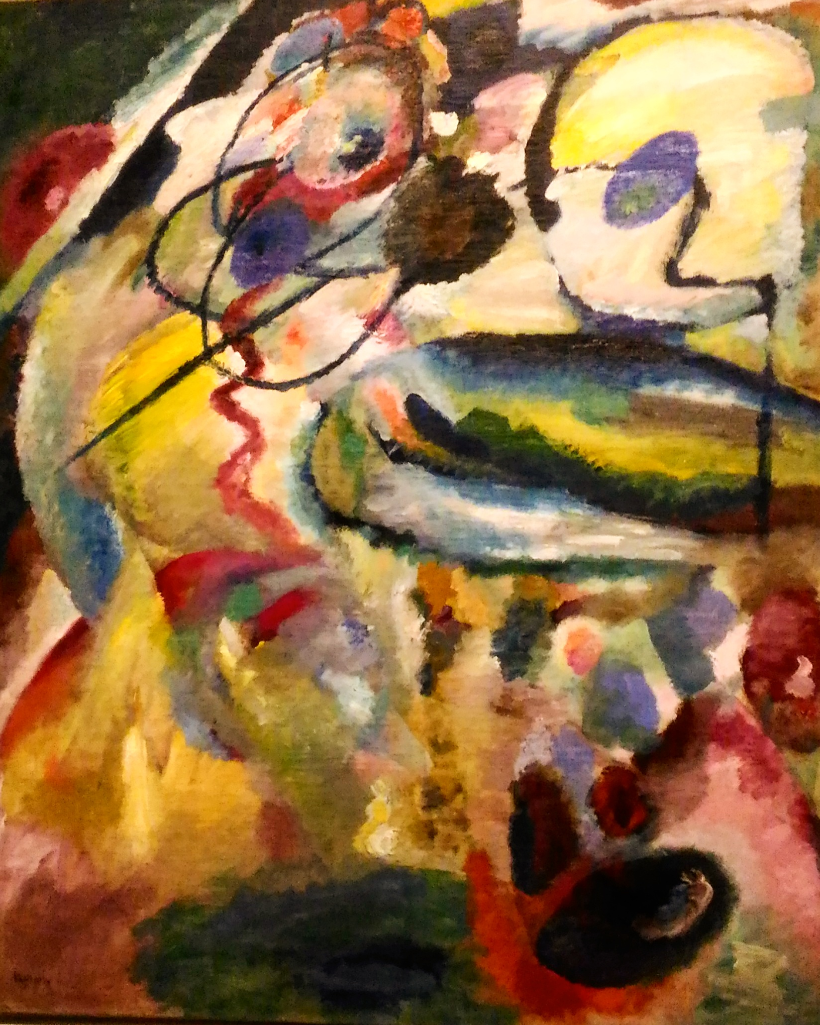 kandinsky